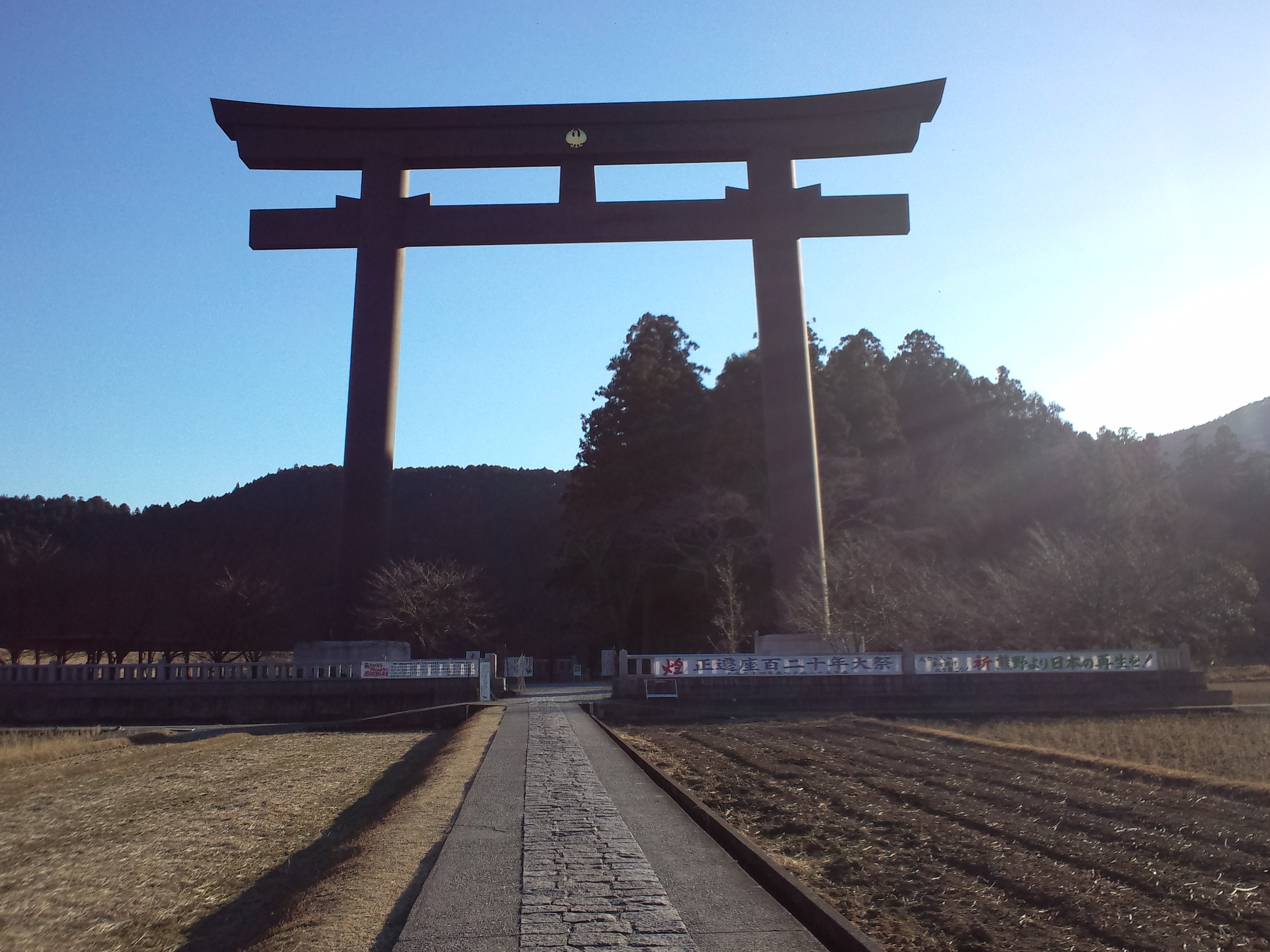 熊野本宮大社 大斎原の大鳥居